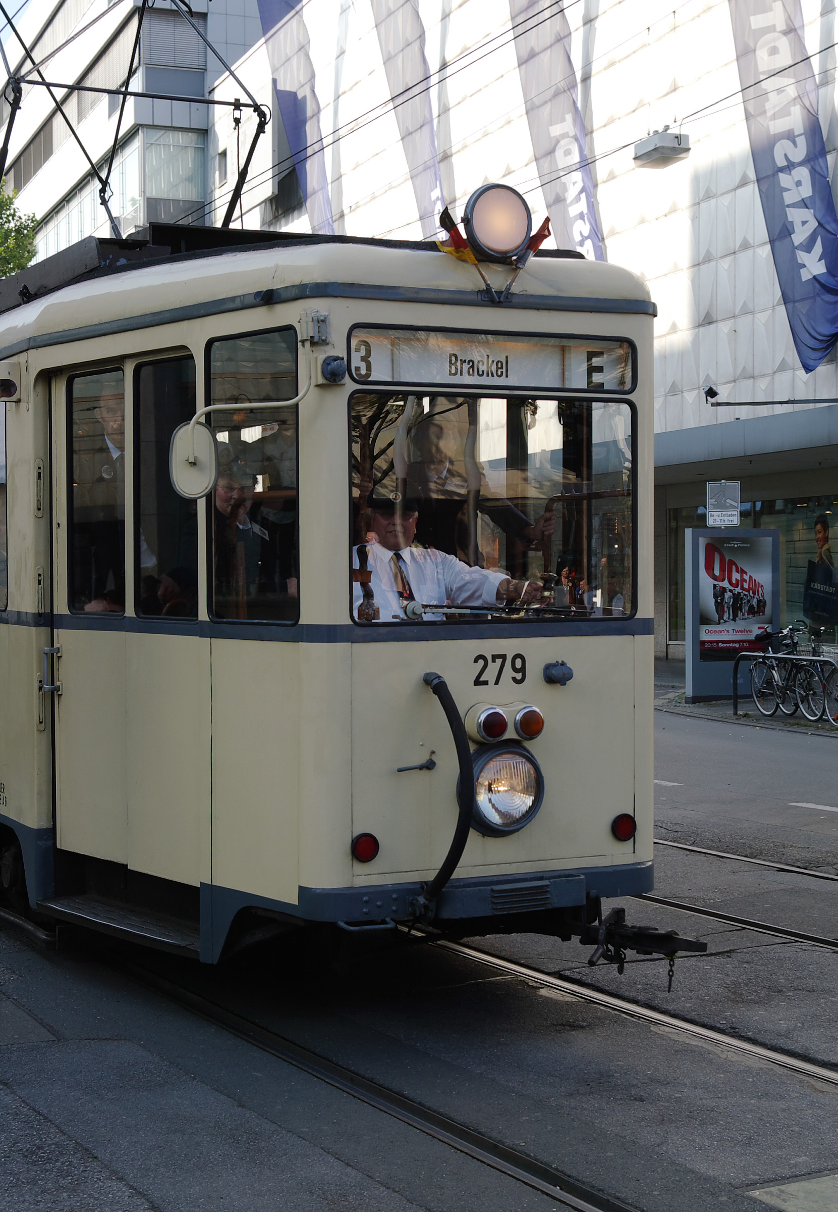 Dortmund alte Straßenbahn, Hersteller Westwaggon, Bj 1950